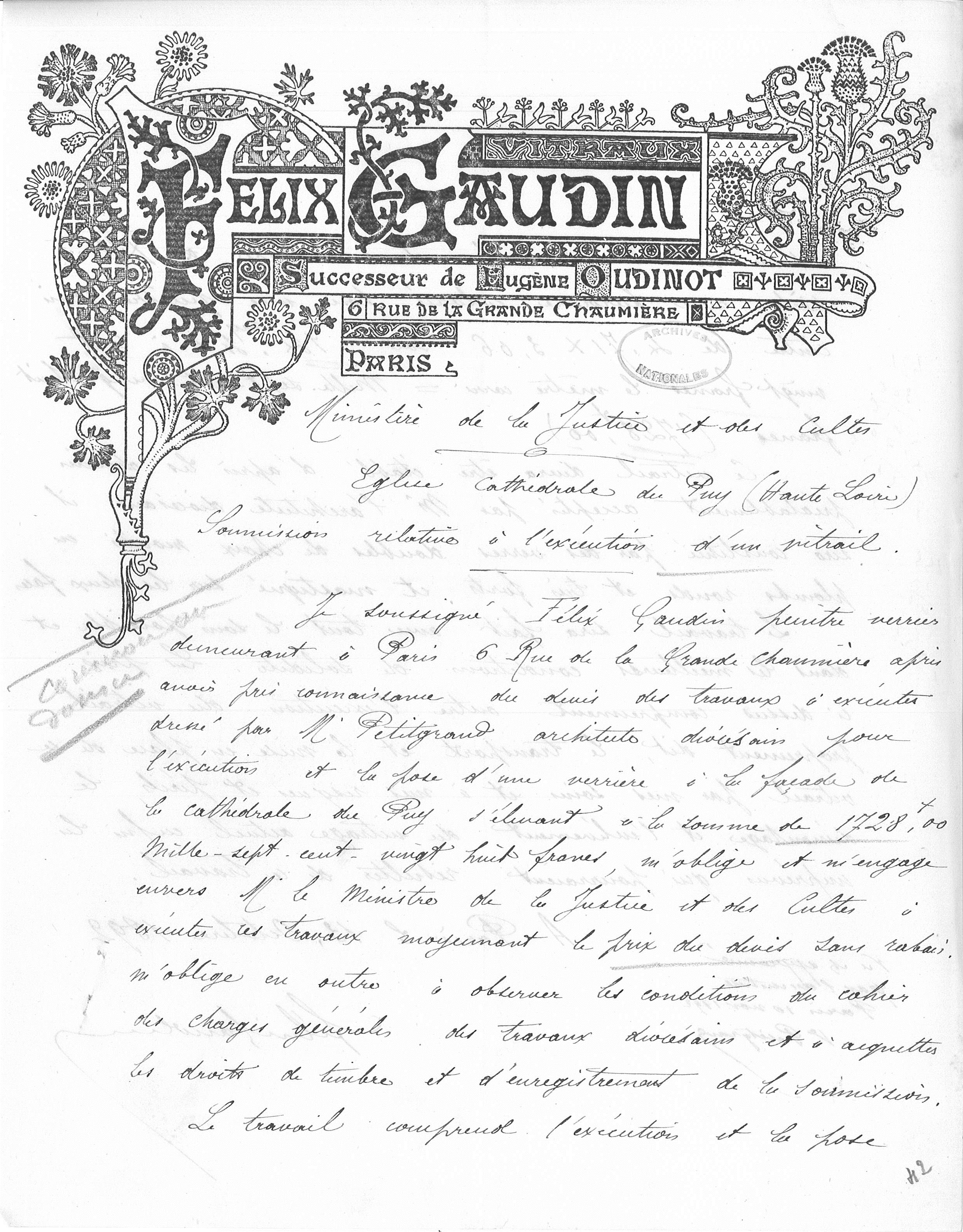 Soumission du peintre verrier Félix Gaudin (6 rue de la Grande-chaumière, Paris), pour la réparation de la verrière de la façade ouest de la cathédrale du Puy (1892). Archives nationales, travaux de restauration de la cathédrale du Puy, cote F/19/7826.